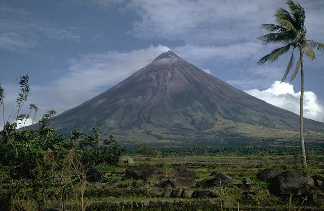 Mayon Volcano, Philippines